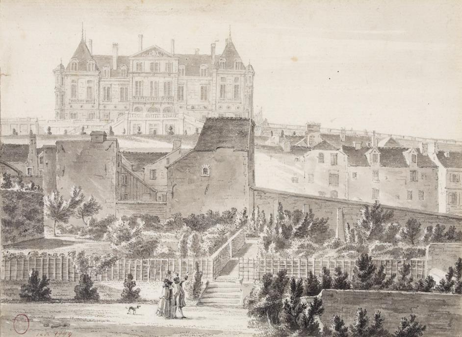 Vue du Château-Vieux et du village de Meudon en contrebas. XVIIIe siècle.